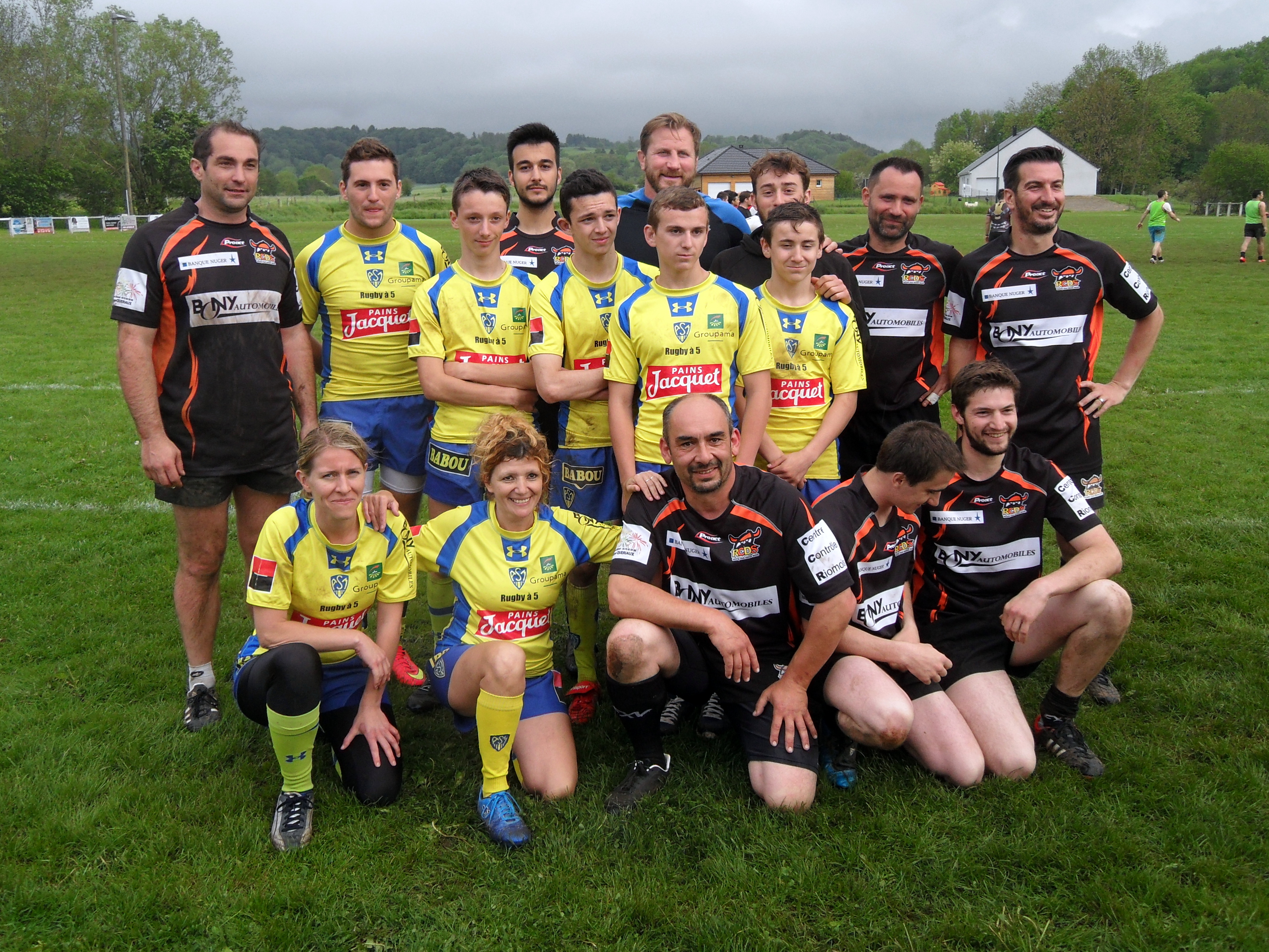 Photographie représentant une groupe de joueuses et de joueurs de rugby à 5.